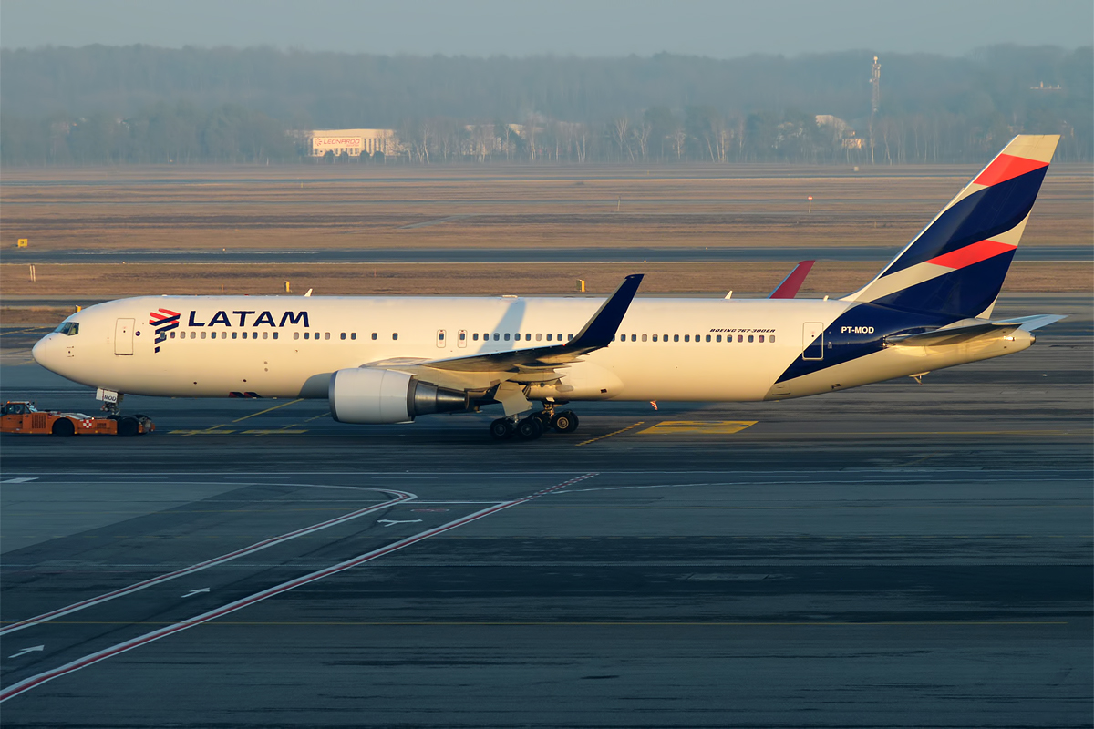 LATAM Brasil, PT-MOD, Boeing 767-316 ER